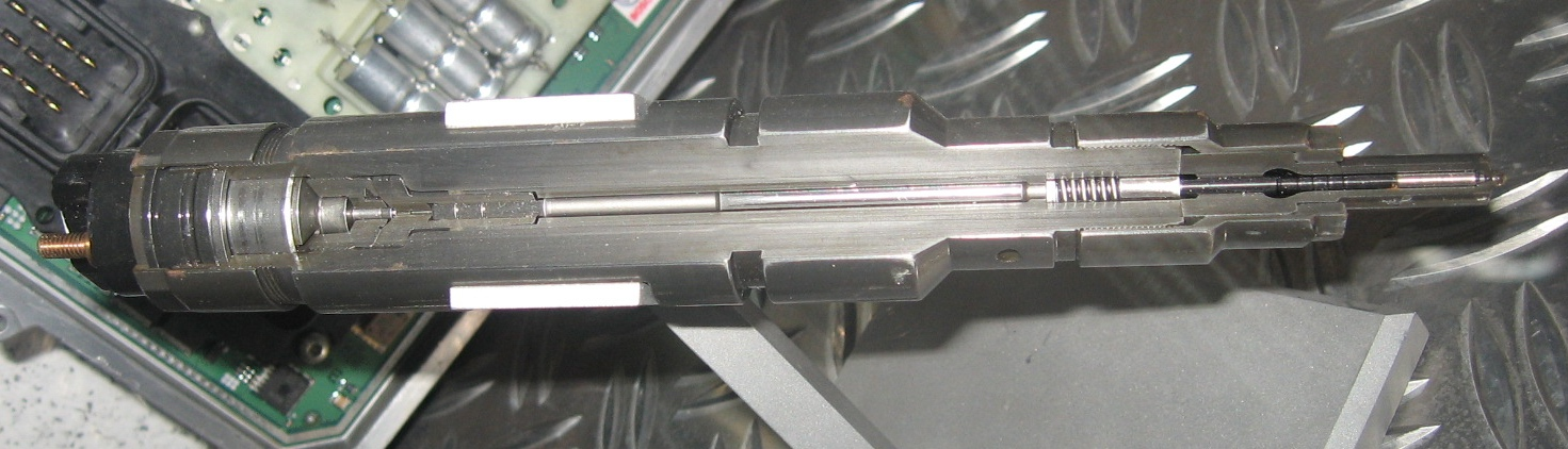 elektrisch steuerbarer Diesel-Injektor von „Bosch“, aufgeschnitten